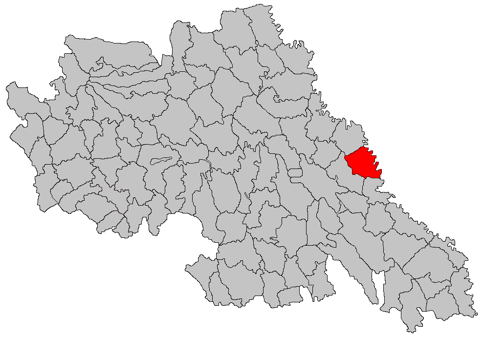 Categorie:Hărţi ale judeţului Iaşi